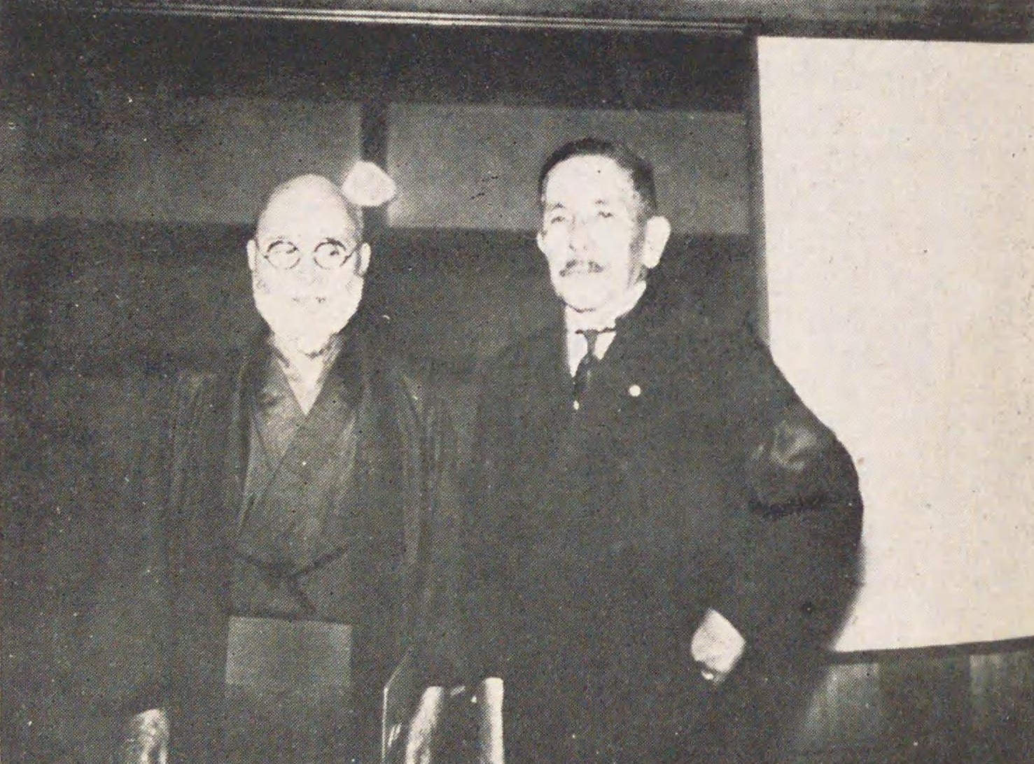 高橋是清と望月圭介